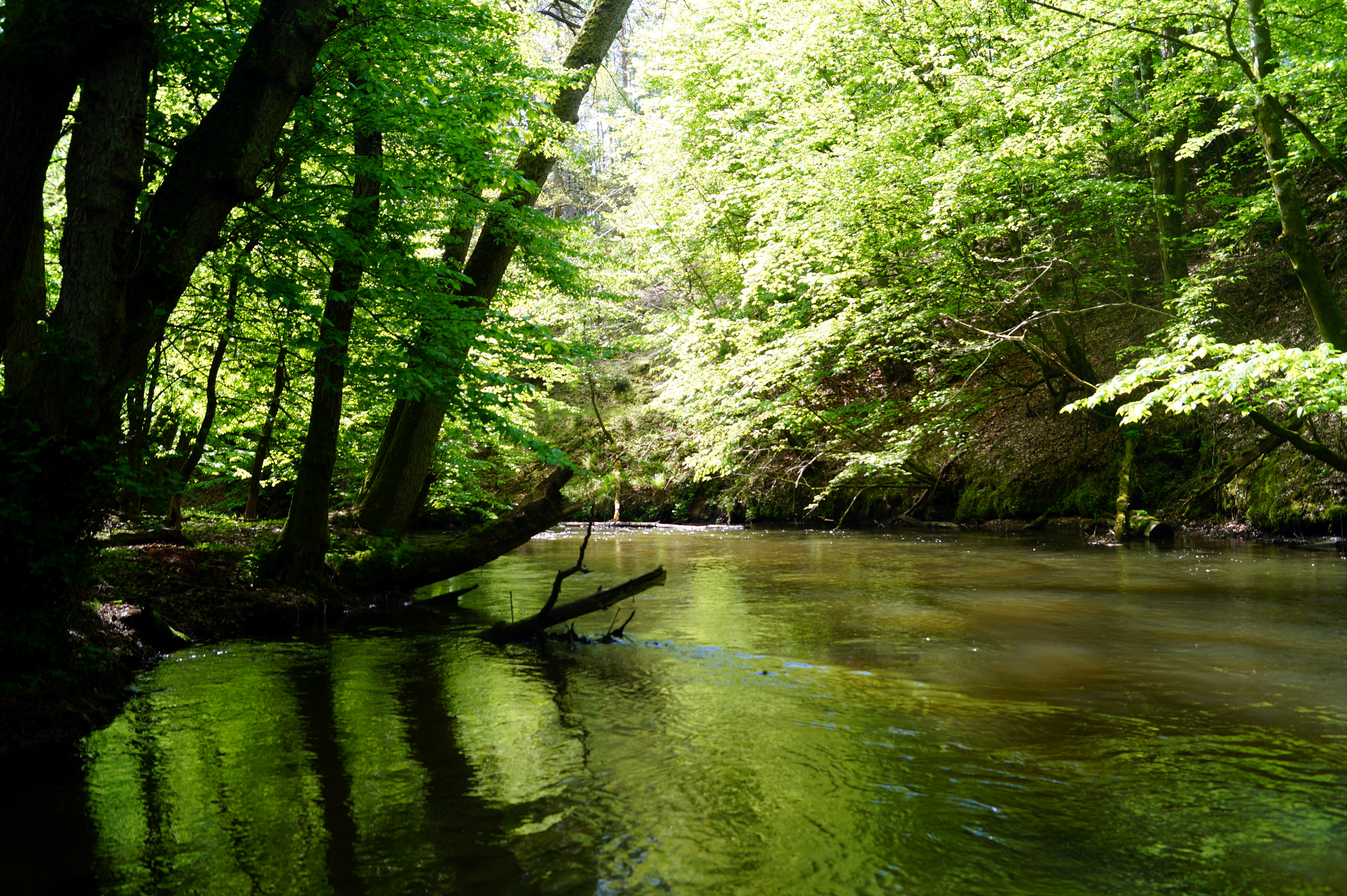 Specjalny obszar ochrony siedlisk Dolina Słupi. This is a photography of Natura 2000 protected area with ID PLH220052